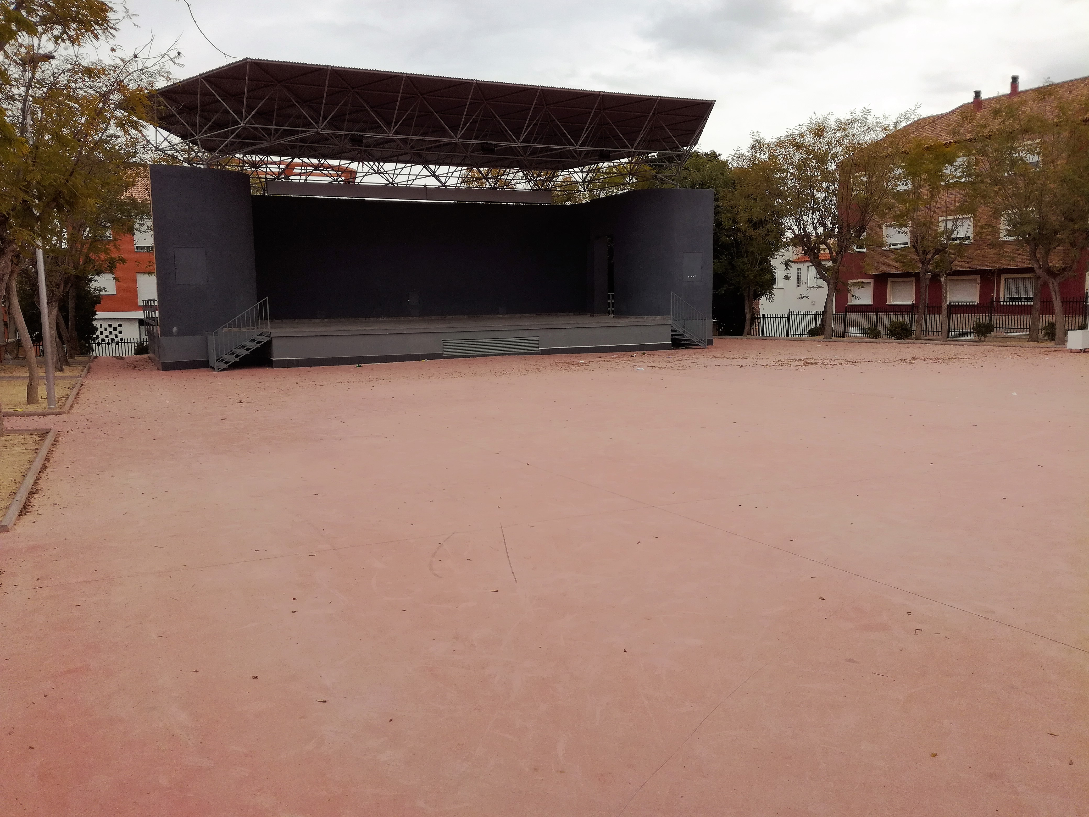 Foto del escenario